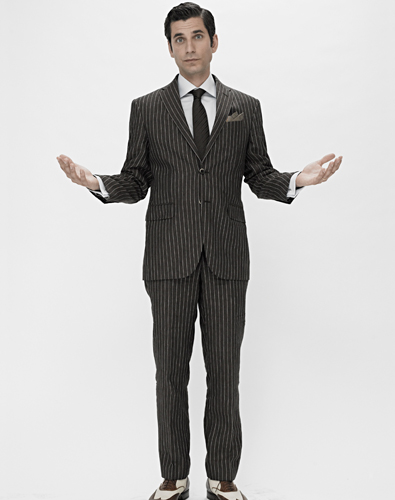 Jens Lapidus for Café Magazine.